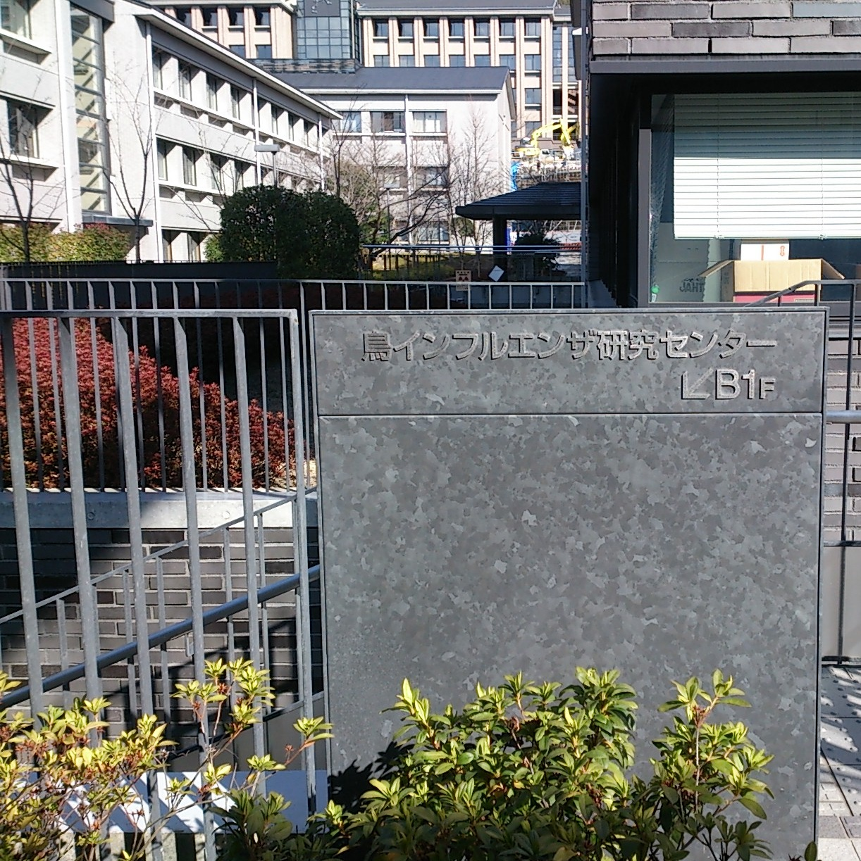 京都産業大学先端科学技術研究所・鳥インフルエンザ研究センター